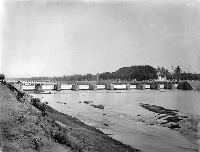 Negatief. Stuwdam te Lengkong, Surabaya